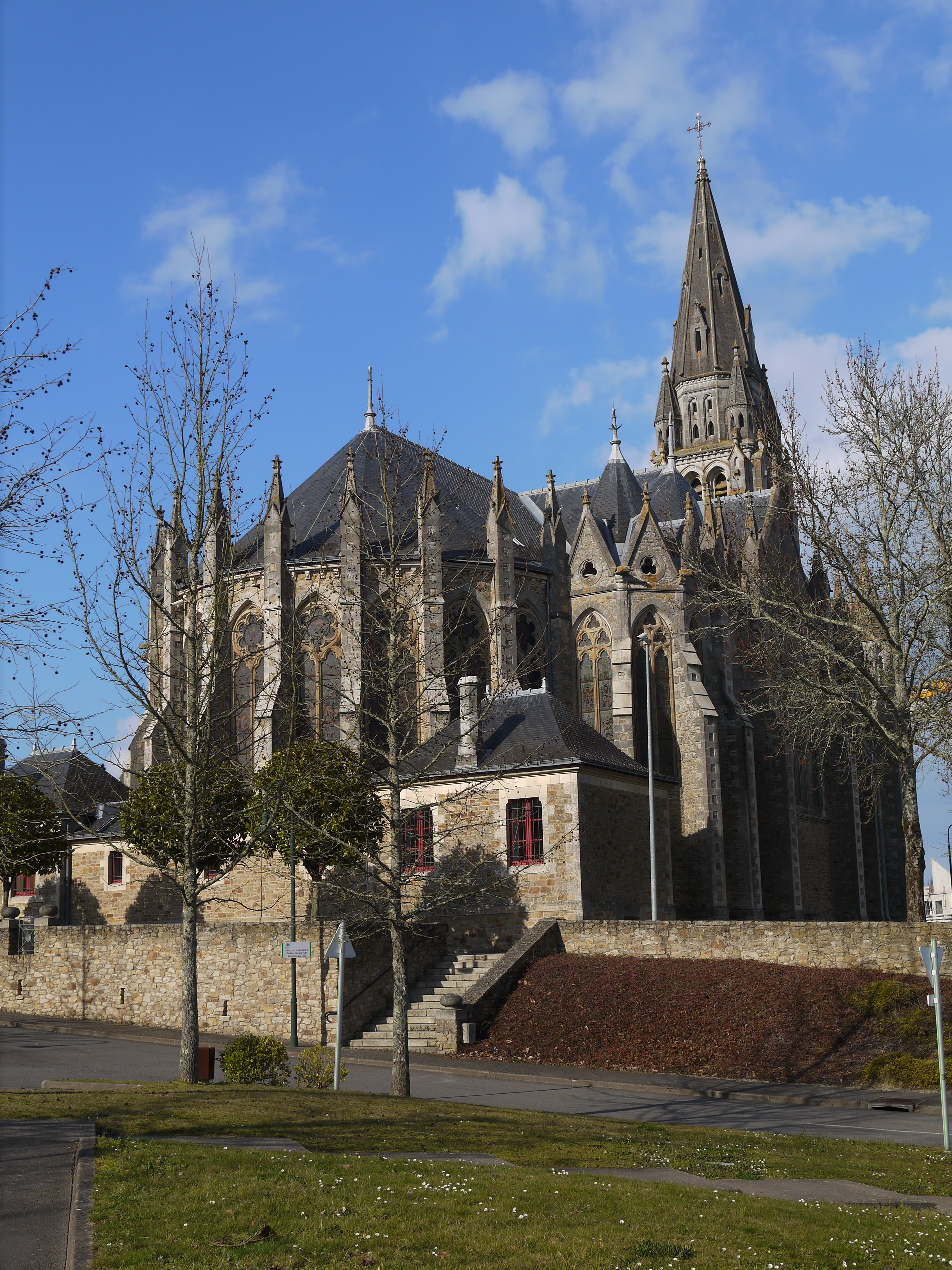 Chevet de l'église St Léger à Orvault